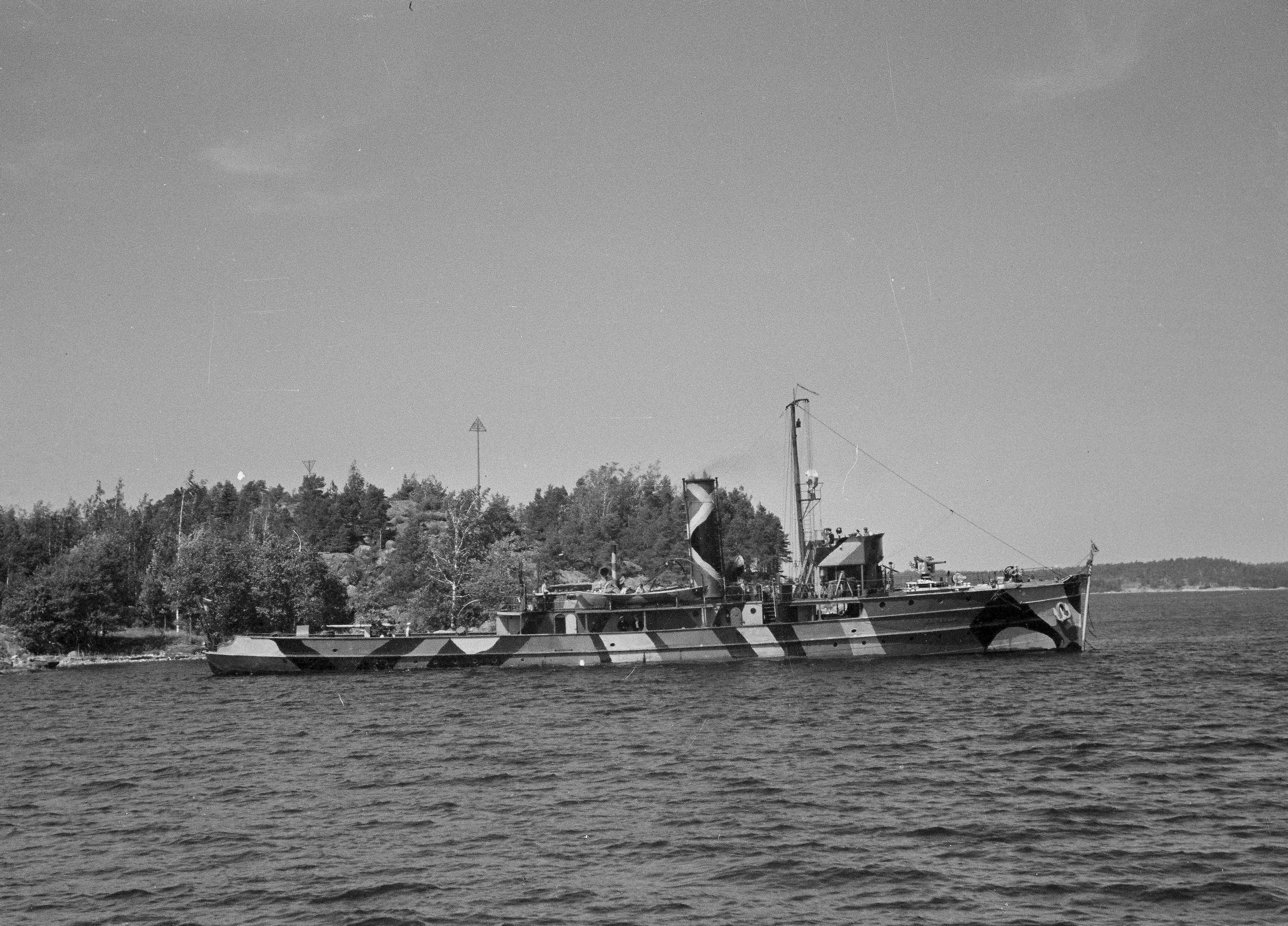 Tykkivene ""Karjala""